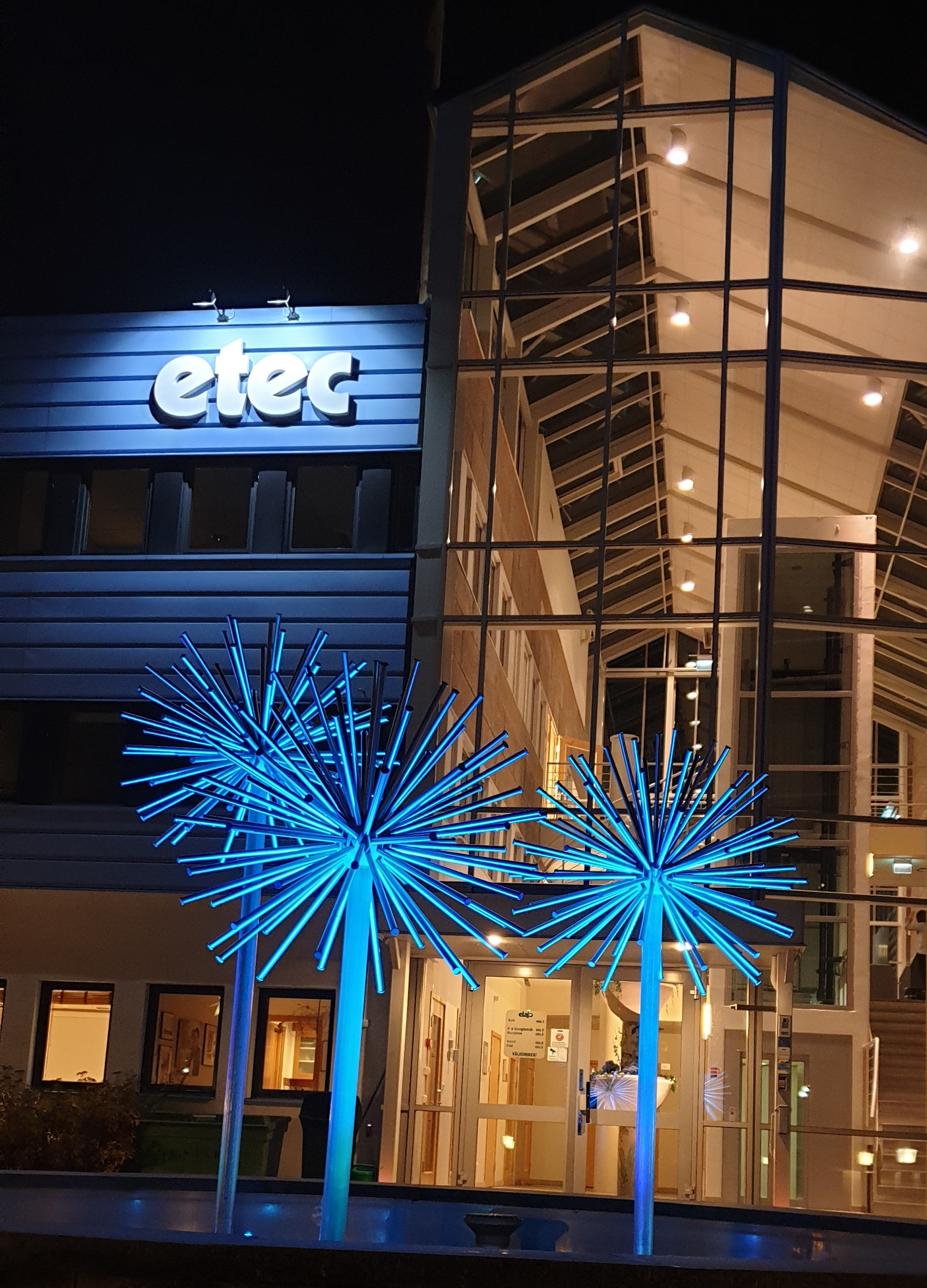 Öppethus 2019